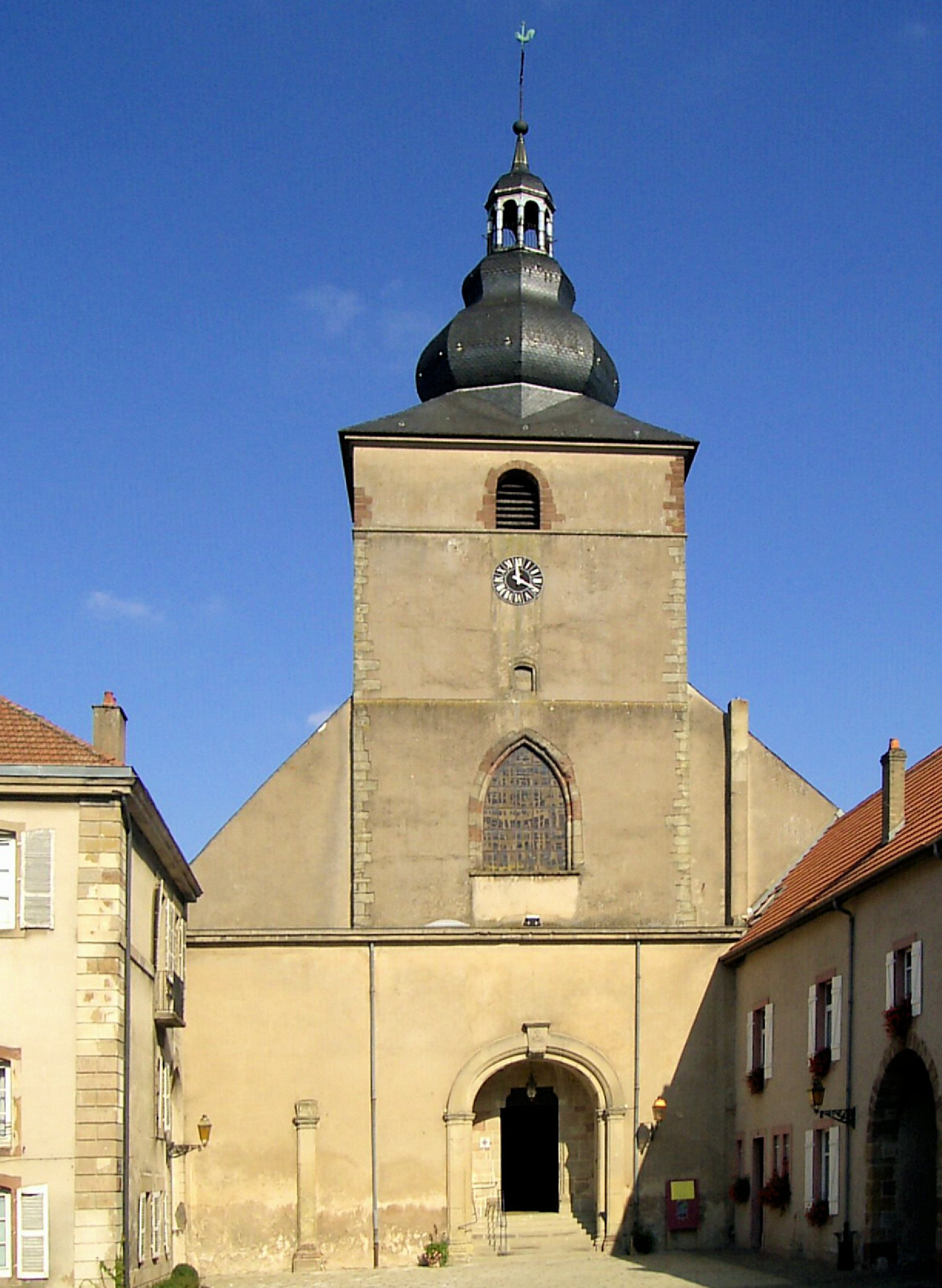 Abbaye Sainte-Croix de Bouzonville